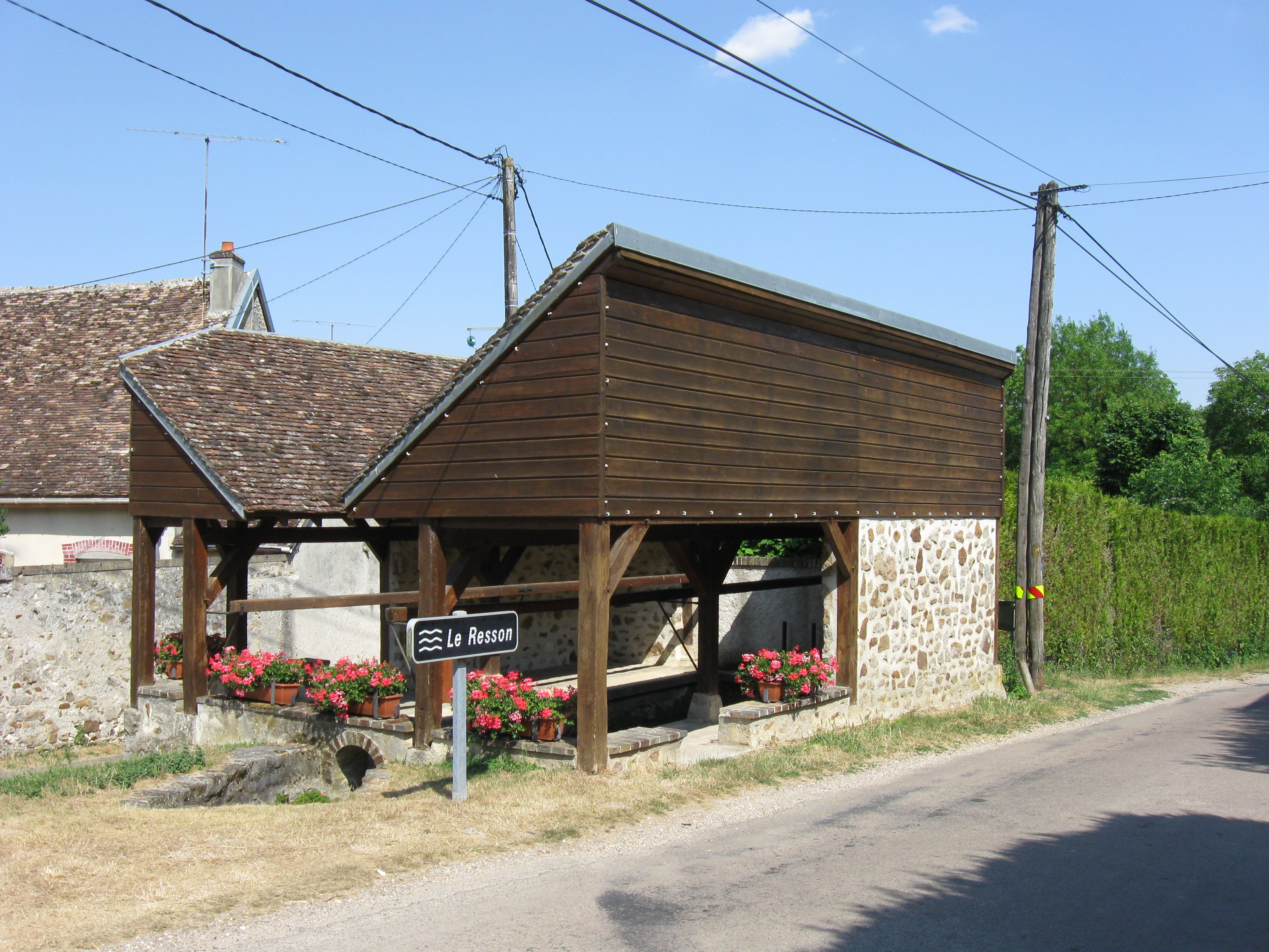 Le ruisseau le Resson et le lavoir de Resson. (Commune de la Saulsotte, Aube, région Champagne-Ardenne).